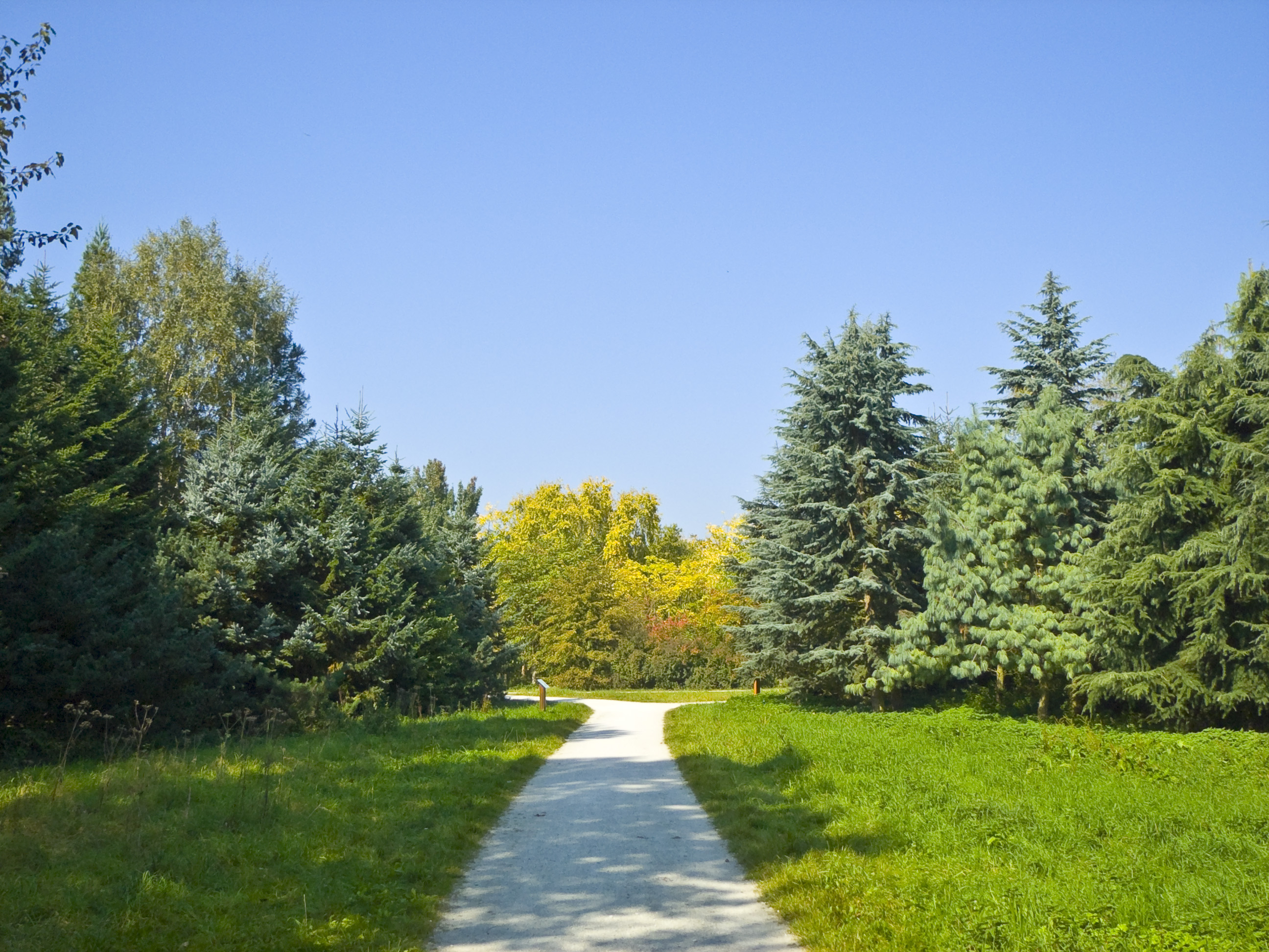 Arboretum Main-Taunus, Abteilung Himalaya, Japan